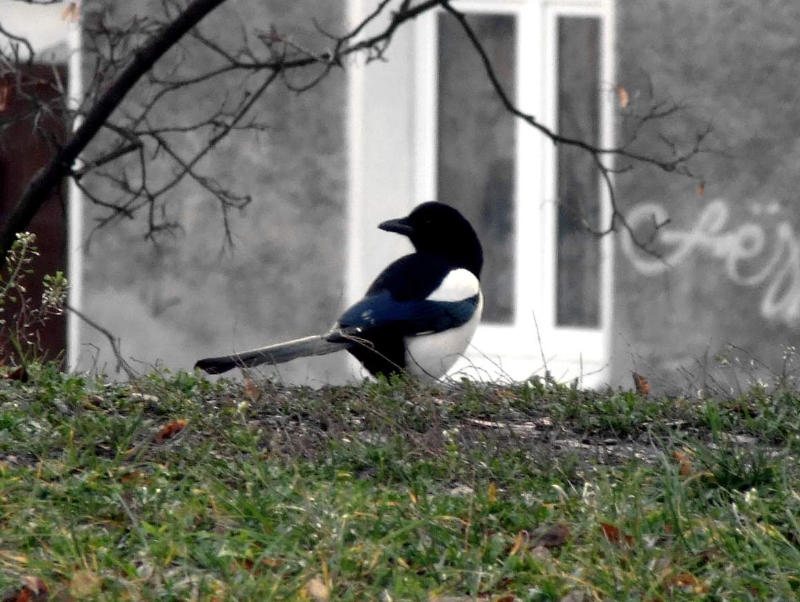 A magpie in Zielona Góra, Poland. Sroka na Winnym Wzgórzu w Zielonej Górze